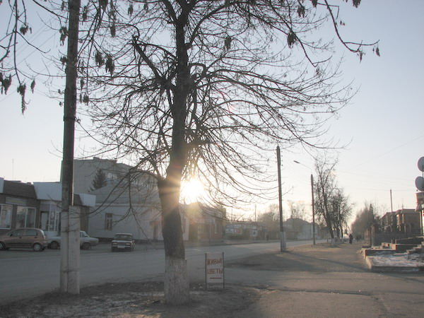 Фатеж